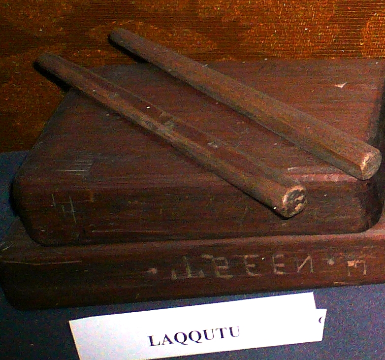 Лаггуту. Музей музыкальных инструментов. Баку, Азербайджан